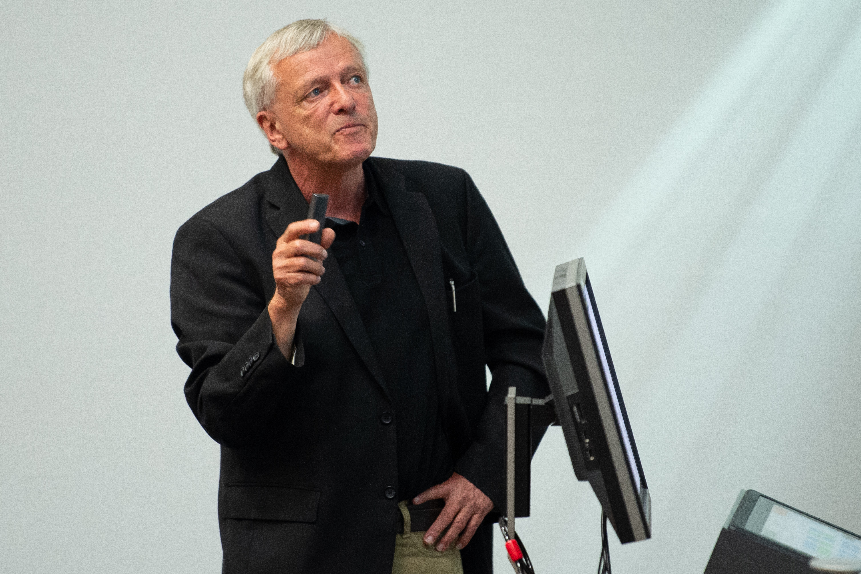 Prof. Rose-John bei der Preisverleihung der Jacob Henle Medaille 2019 an der Universität Göttingen